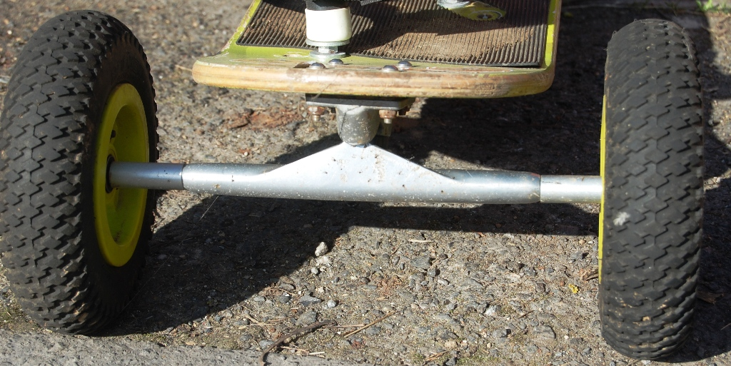 Eje tipo skate